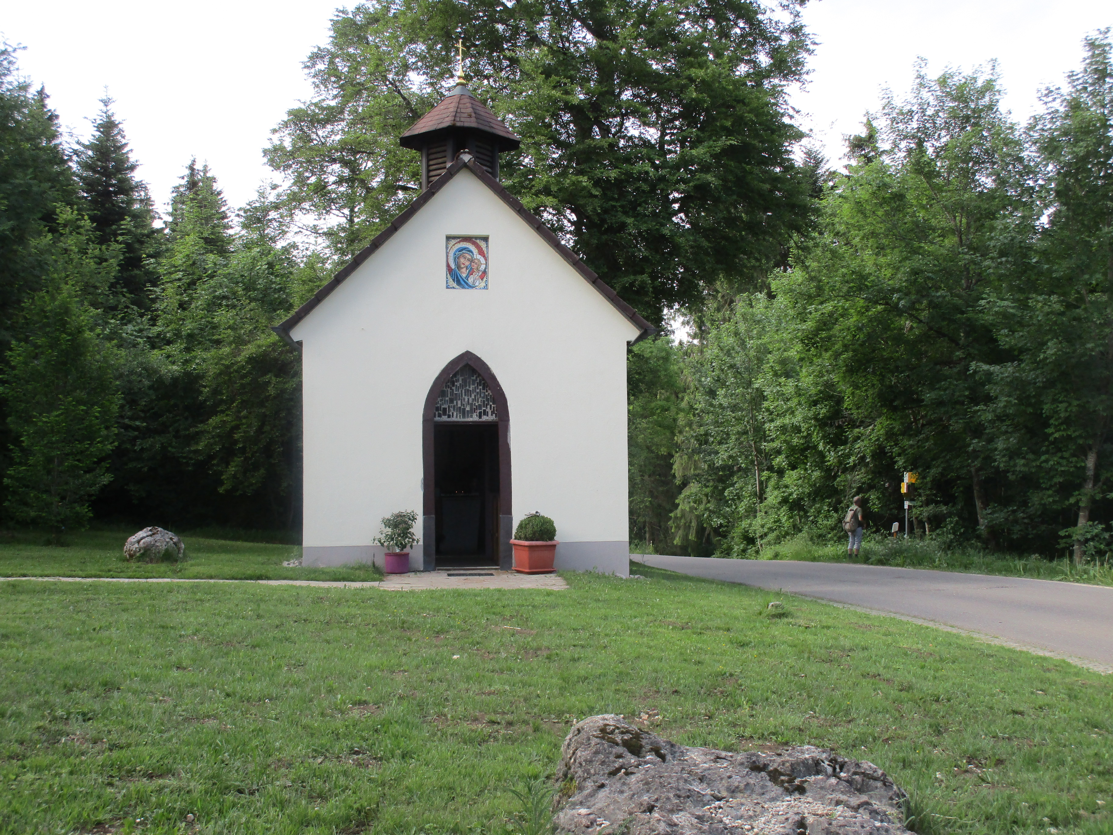 Die Quirinskapelle Gosheim wurde im Jahr 1858 oberhalb von Gosheim in der Schwäbischen Alb in einer Höhe von 987 Metern an der heutigen Kreisstraße 5905 von Gosheim nach Böttingen errichtet. An der Kapelle führt der Schwäbische-Alb-Nordrand-Weg vorbei.